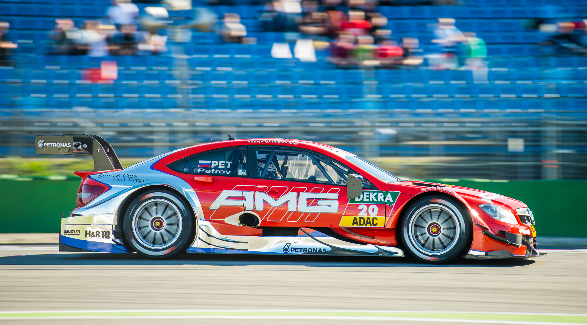 DTM,Deutsche Tourenwagen Masters,Hockenheimring,Mercedes AMG C-Coupe,Motorsport,Mücke Motorsport,Vitaly Petrov